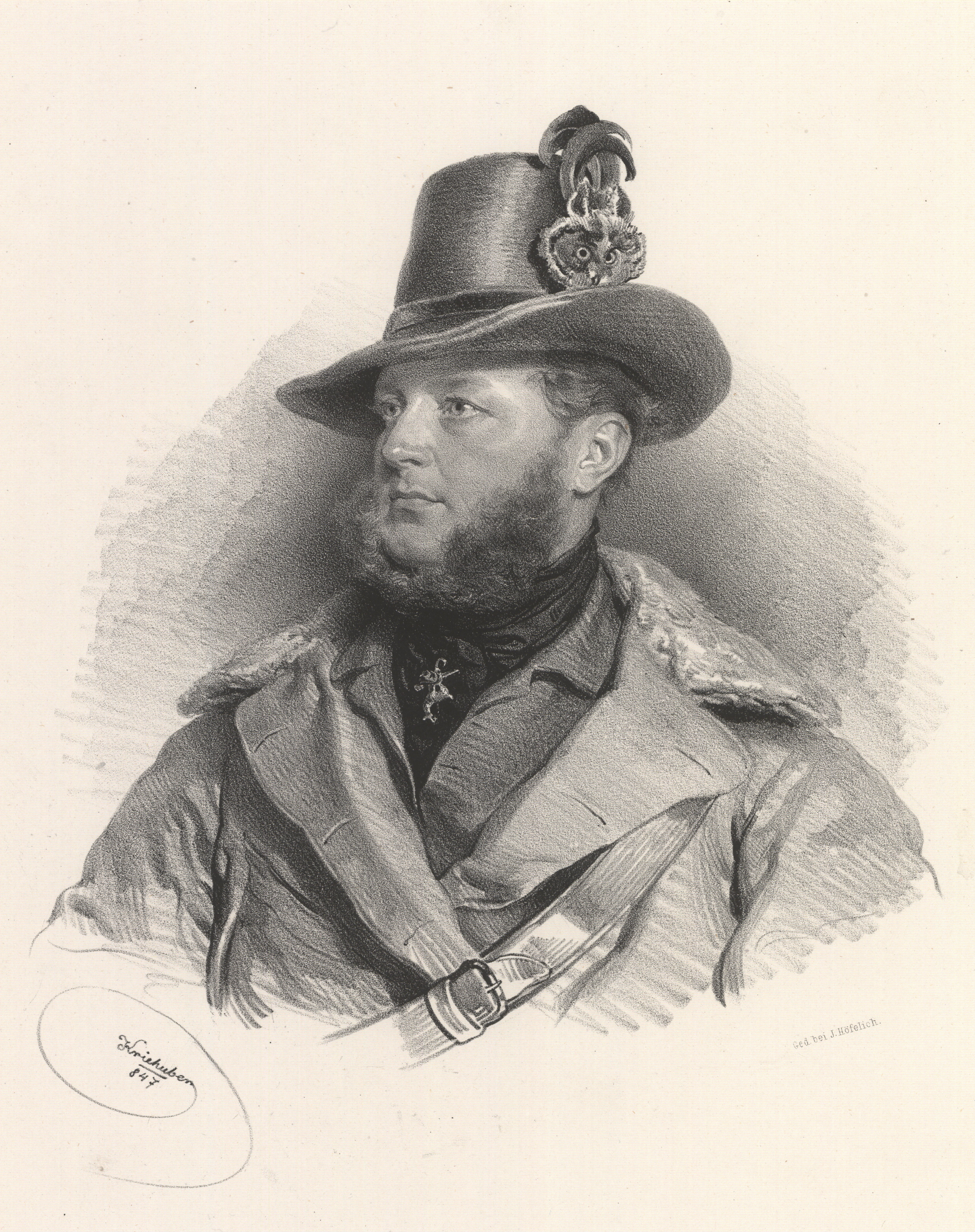 Kazimierz Władysław Starzeński